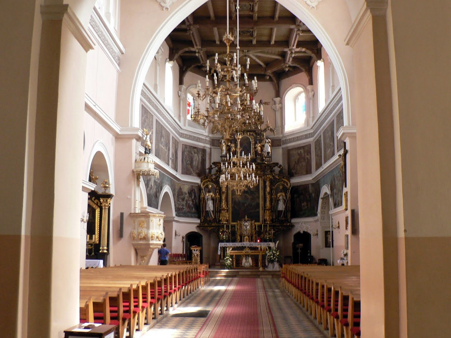 Kościół pw. Wniebowzięcia NMP we Wrześni